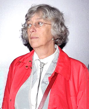 Avant-première du film Le Petit Nicolas au Grand Rex, à Paris, le 20 Septembre 2009, en présence de toute l'équipe de film. Ici, Anémone.